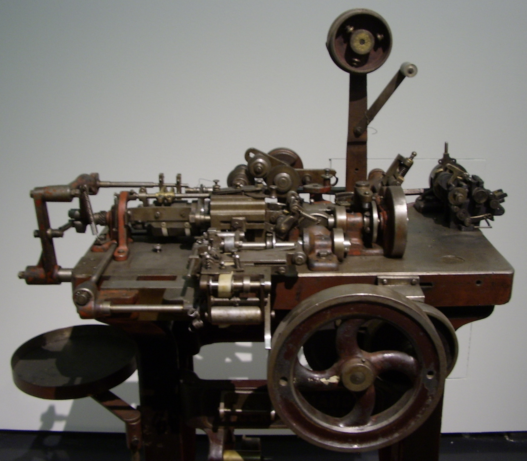 Zigarettenhülsenmaschine L. J. Tillmanns, Moskau 1901, benutzt in Dresden